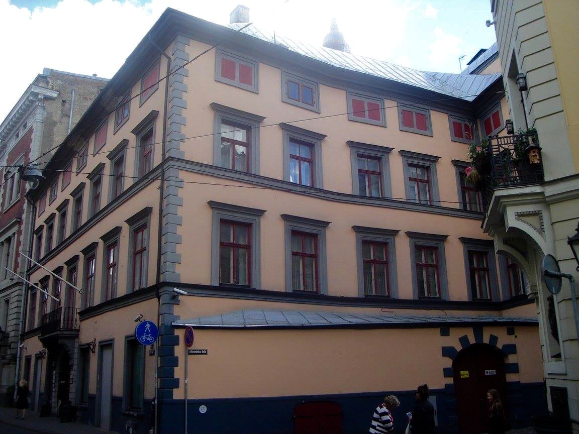 Dzīvojamā ēka, Rīga, Pils iela 21